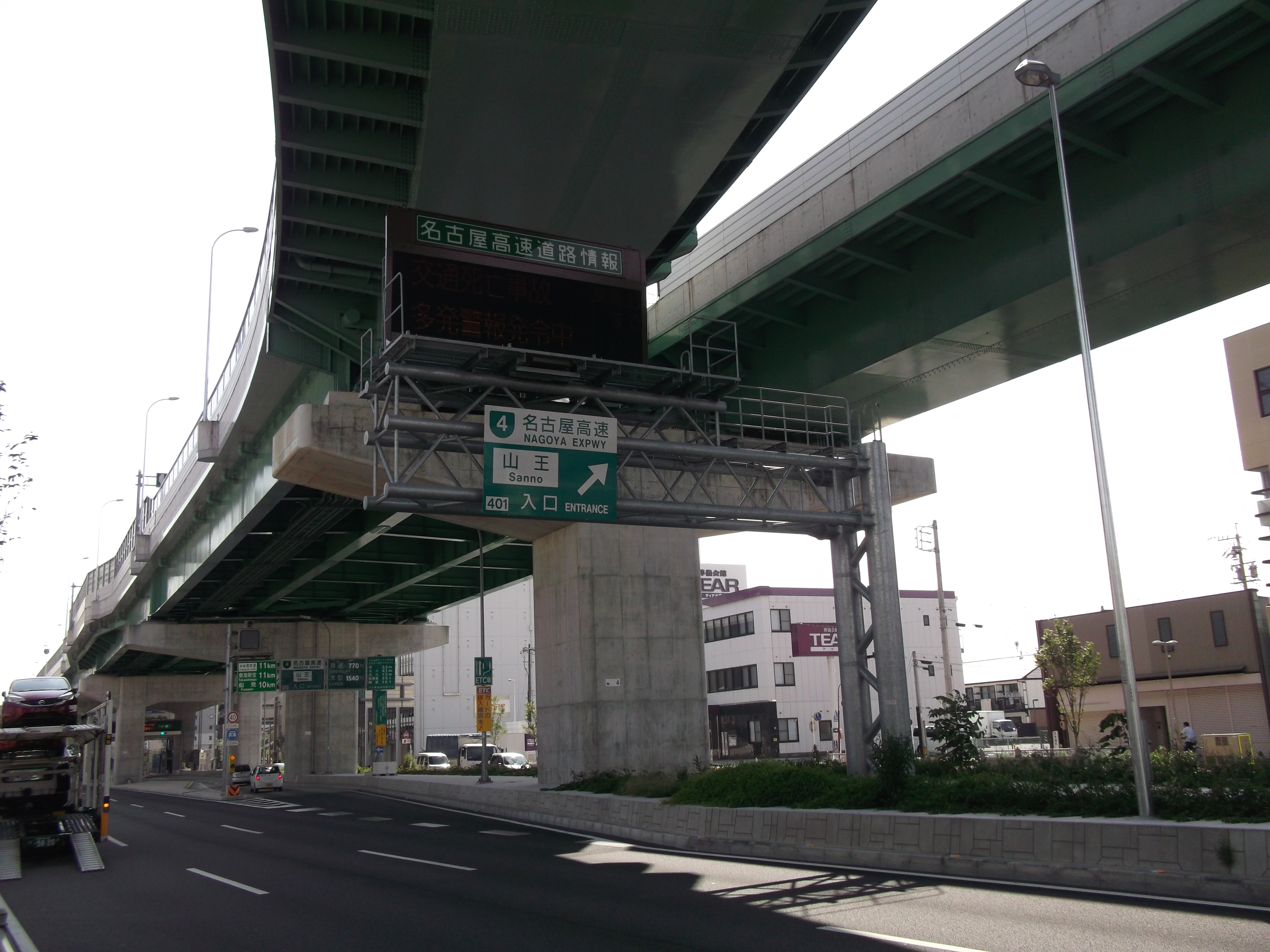 名古屋市中川区の名古屋高速道路4号東海線山王入口を北東側から撮影